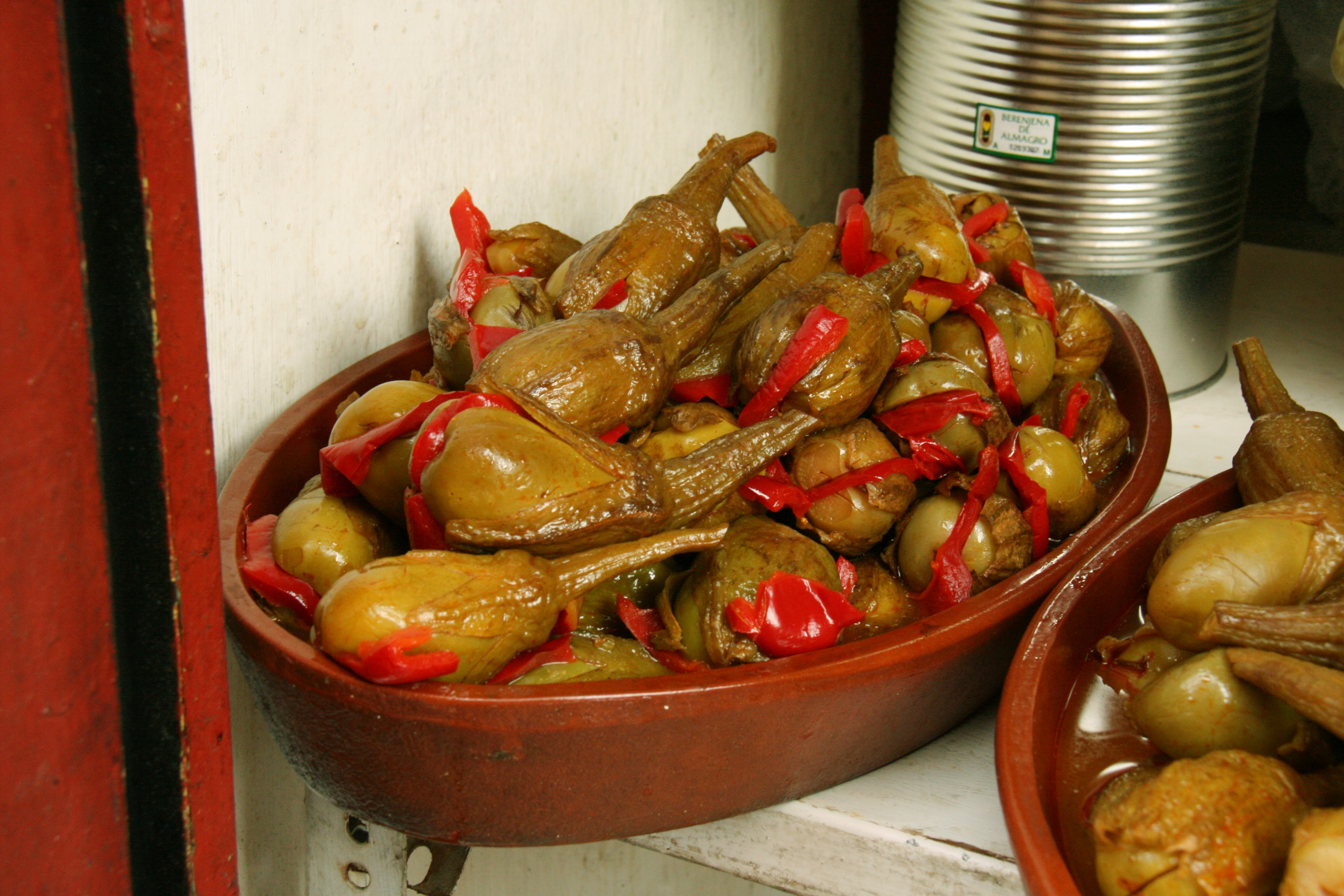 Berenjenas de Almagro, rellenas de pimiento